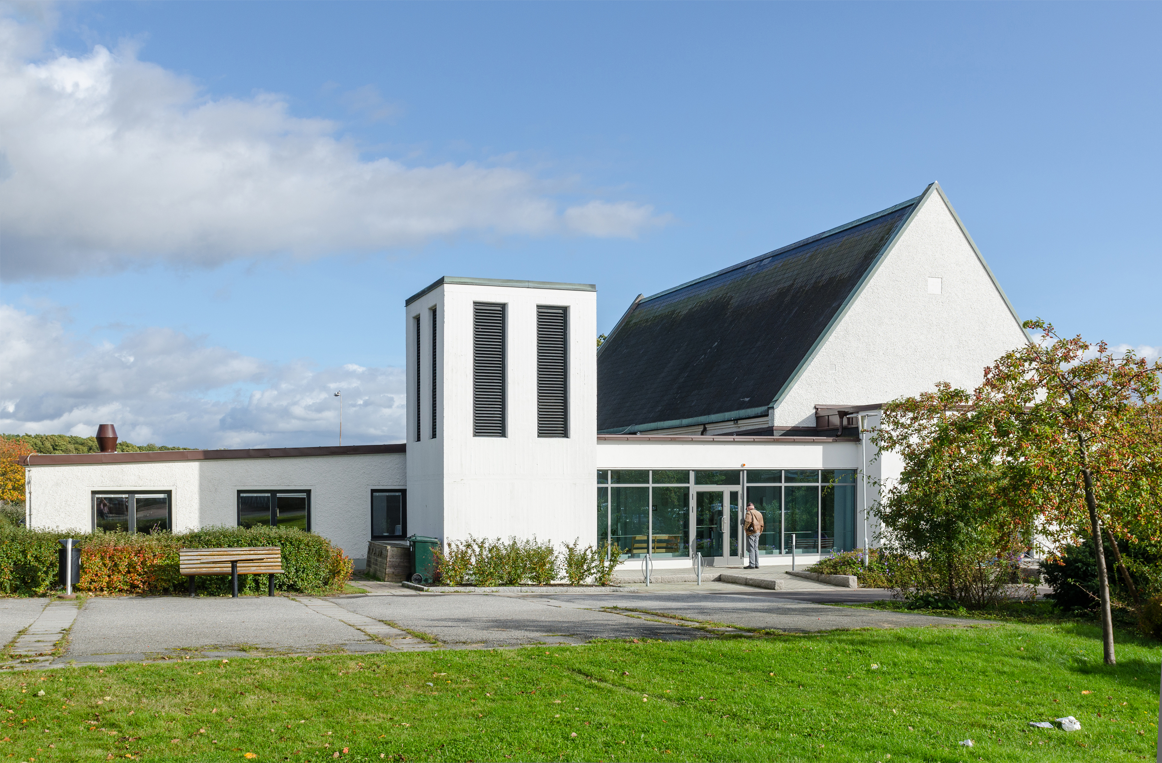 Näsets kyrka (church). Gothenburg, Sweden. Church of Sweden, Näset Parish.